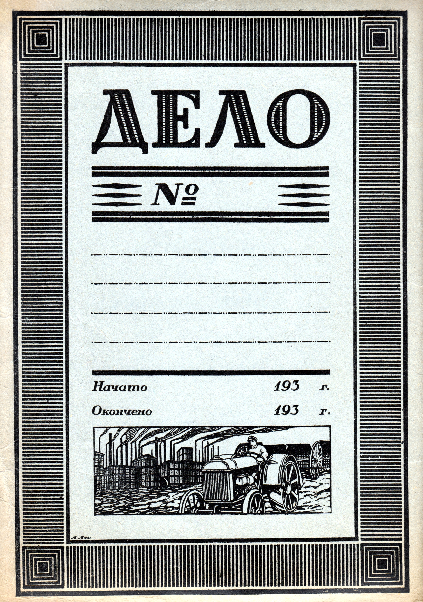 Дело — подборка документов, объединённых по какому-то признаку и хранящихся вместе. Папки с надписью "Дело" используются в делопроизводстве.